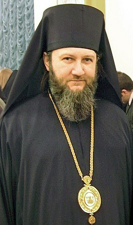 Викарни епископ Моравички Антоније